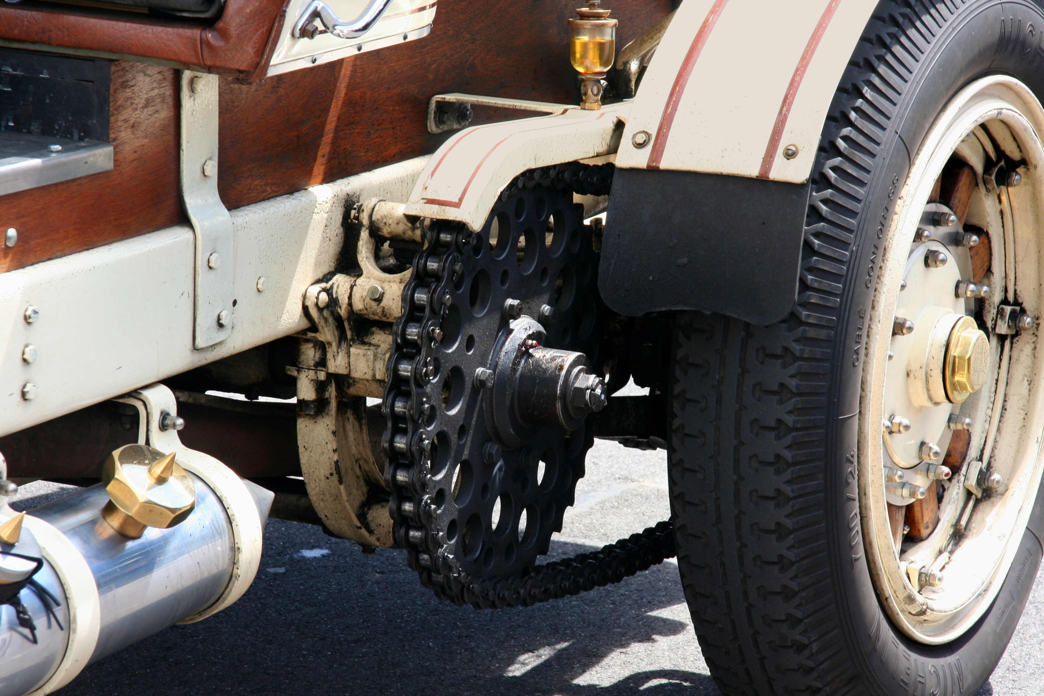 American LaFrance, Bj. 1918, beim Oldtimer-Festival; Antriebskette